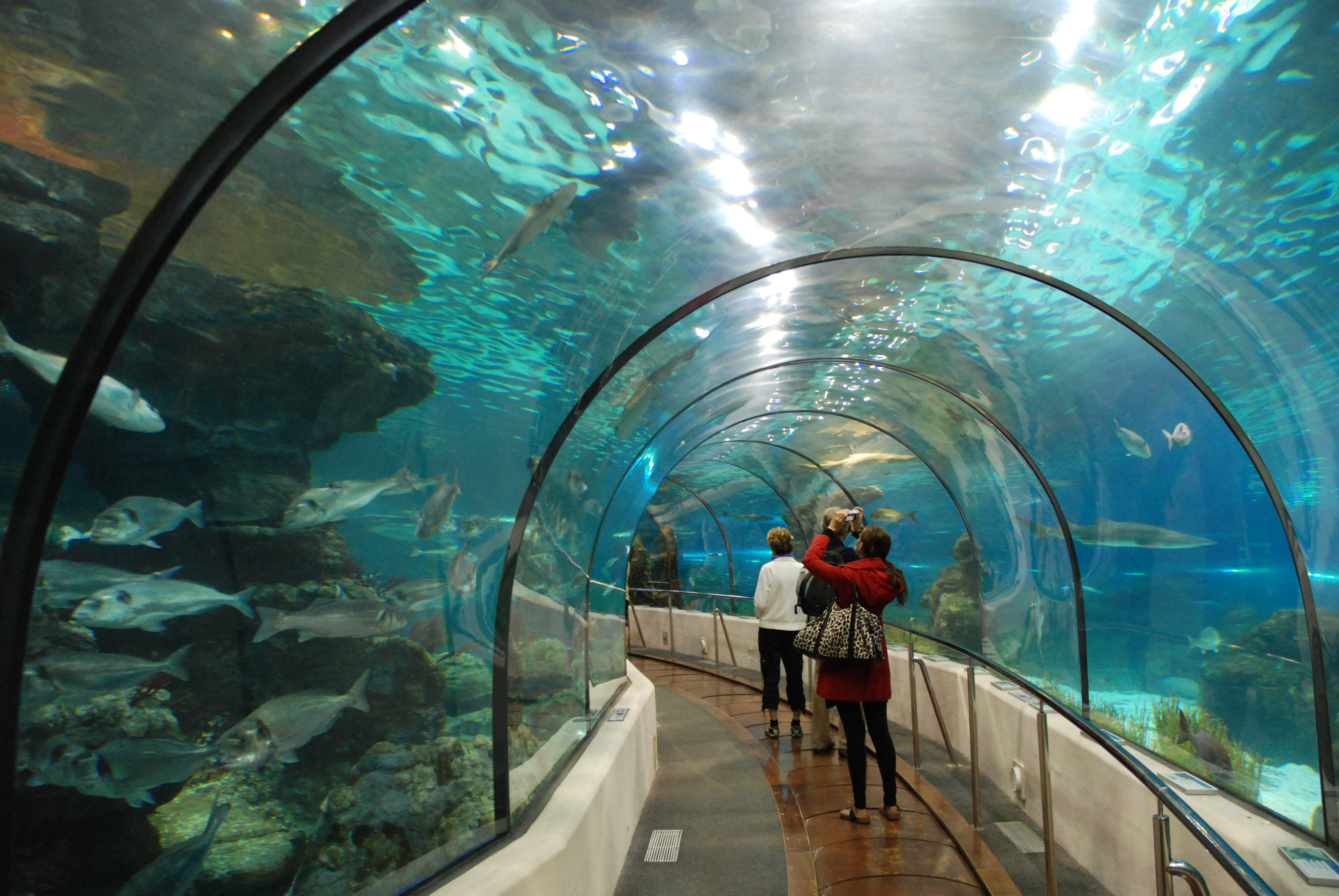 De tunnel van het aquarium te Barcelona, Spanje.